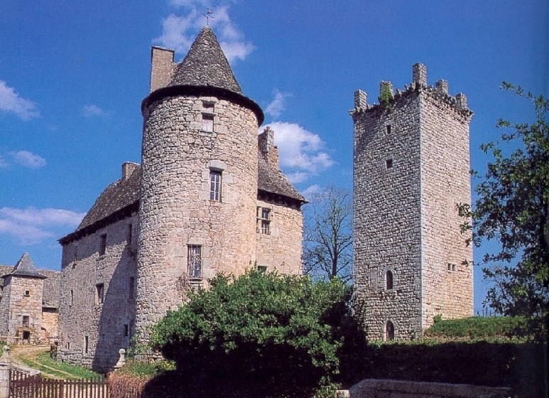 Château de Sénergues